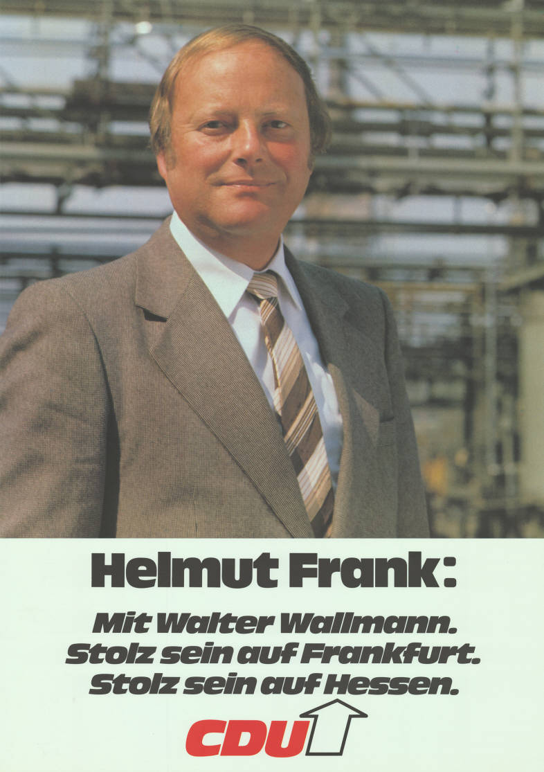 Helmut Frank: Mit Walter Wallmann. Stolz sein auf Frankfurt. Stolz sein auf Hessen. CDU Abbildung: Foto Plakatart: Kandidaten-/Personenplakat mit Porträt Objekt-Signatur: 10-007 : 613 Bestand: Landtagswahlplakate Hessen (10-007) GliederungBestand10-18: Landtagswahlplakate Hessen (10-007) » CDU Lizenz: KAS/ACDP 10-007 : 613 CC-BY-SA 3.0 DE